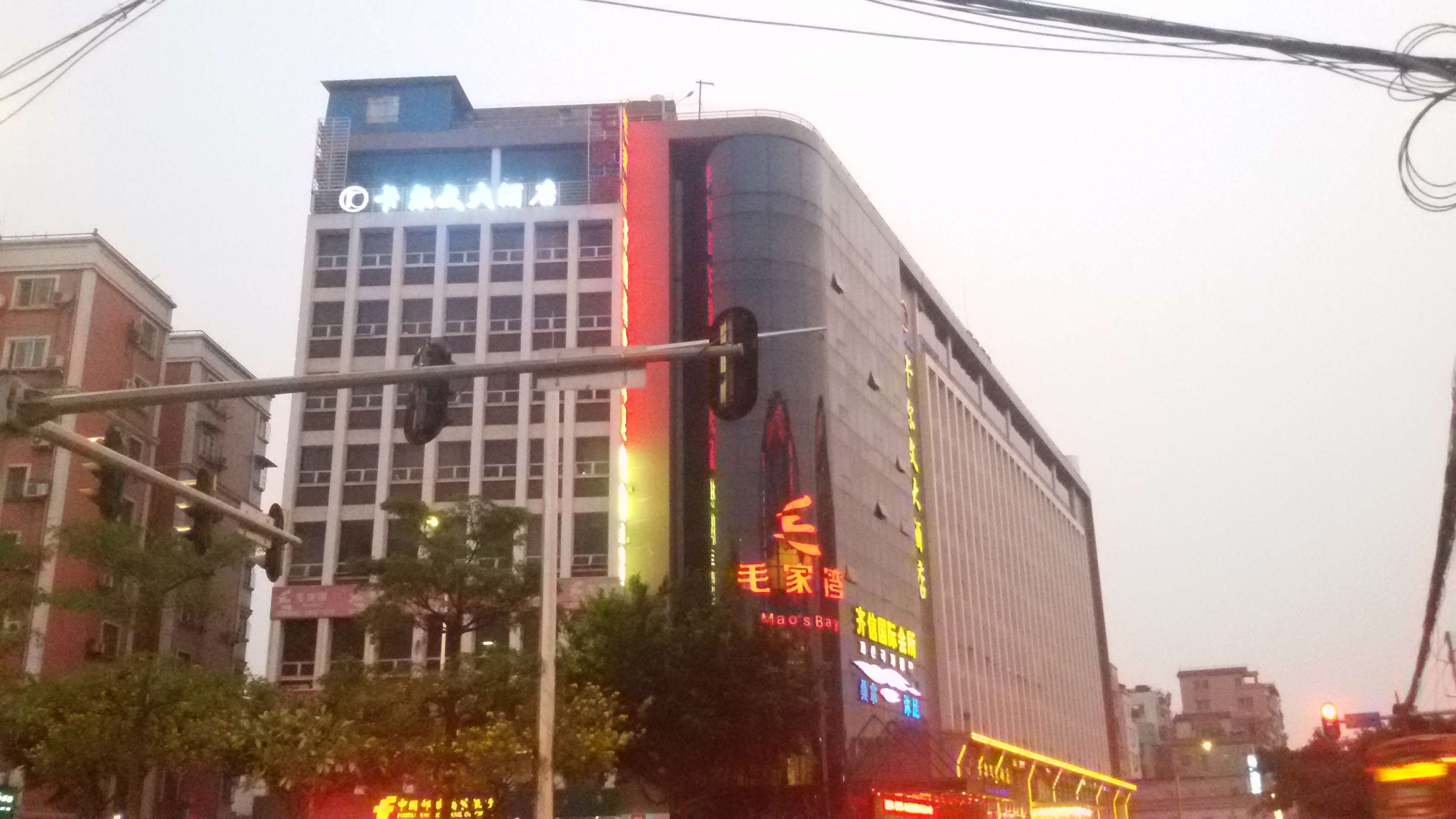 粵語: 卡爾文大酒店